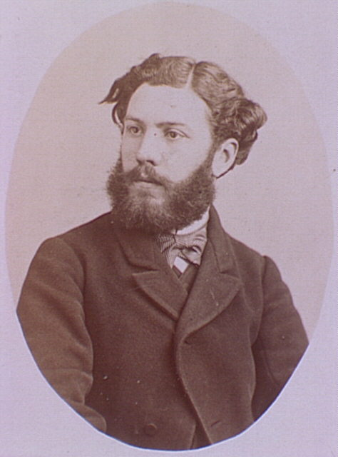 Alphonse Humbert (1844-1922)